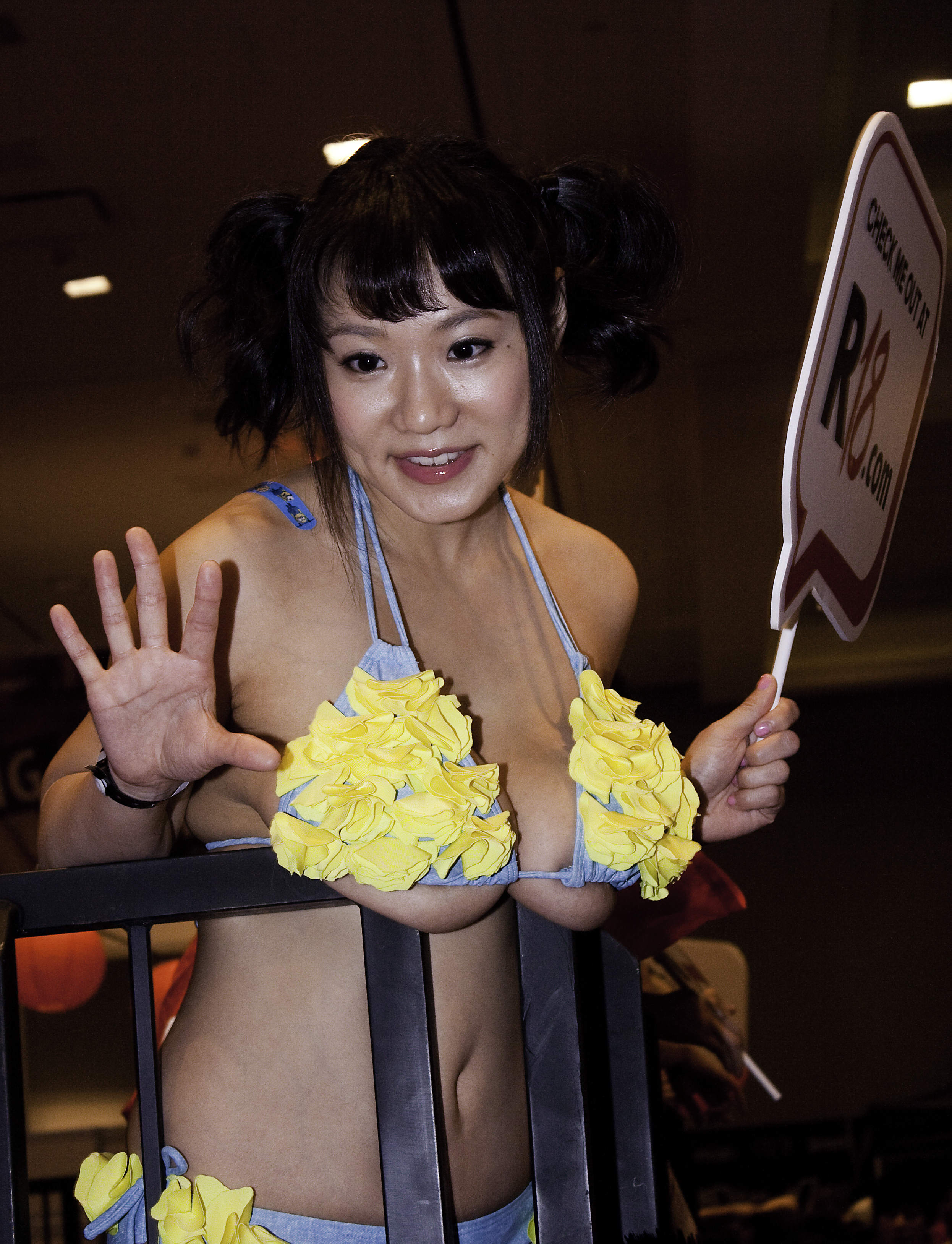 AEE16_0433bas